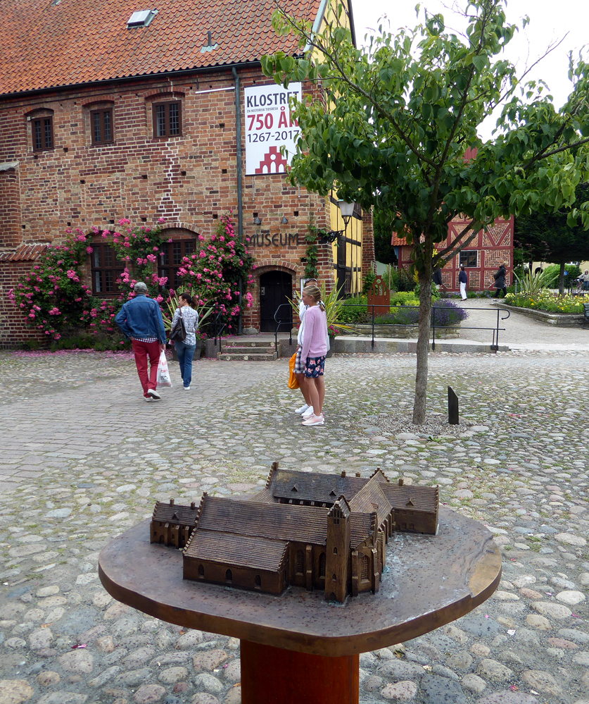 Bronsmodell av Ystads Kloster, skapad av Anders Ödman till Ystads Klosters 750 års jubileum 2017. Gåva till Ystad och klostret från Ystads Fornminnesförening.